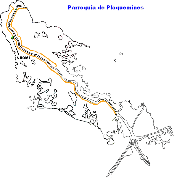 Naomi, Louisiana.